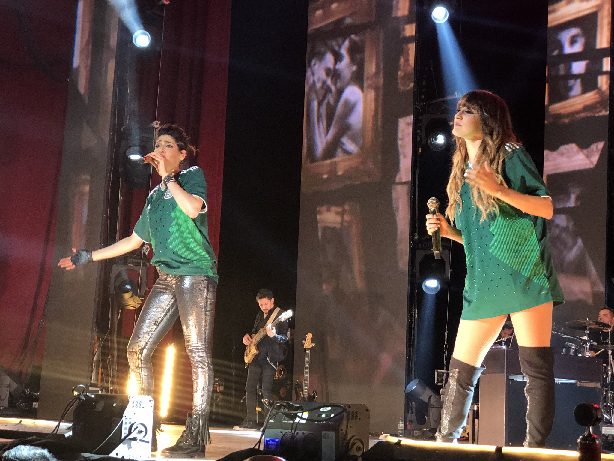 Ha*Ash Auditorio Nacional México 11 de Noviembre de 2018